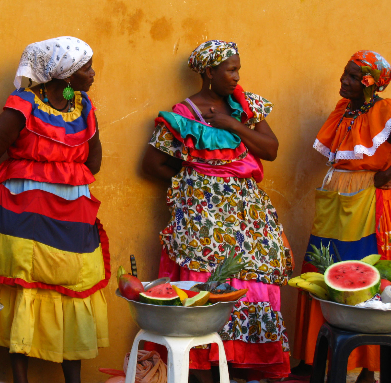 Vendedoras de frutas en Cartagena de Indias, Colombia.